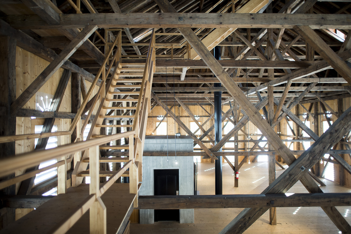 Das Anna Göldi Museum eröffnete 2017 in den Räumen des Hänggiturms. Photo Credits: Samuel Trümpy Photography